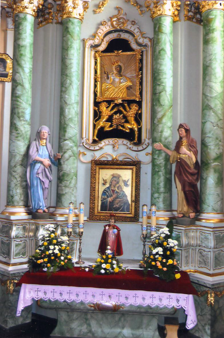 Ołtarz św. Tekli w bazylice oo. Bernardynów w Kole